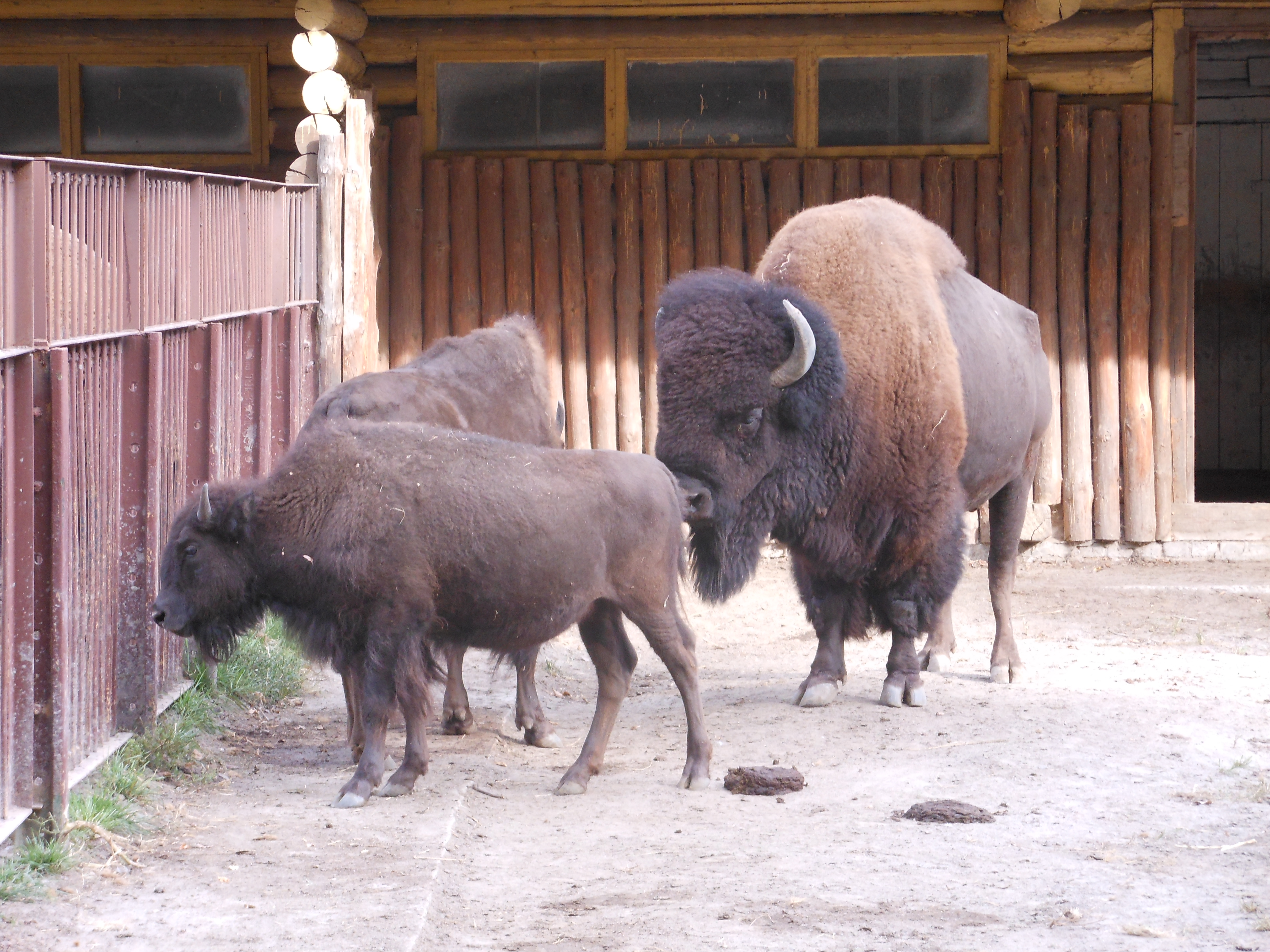 Київський зоопарк, Шевченківський район